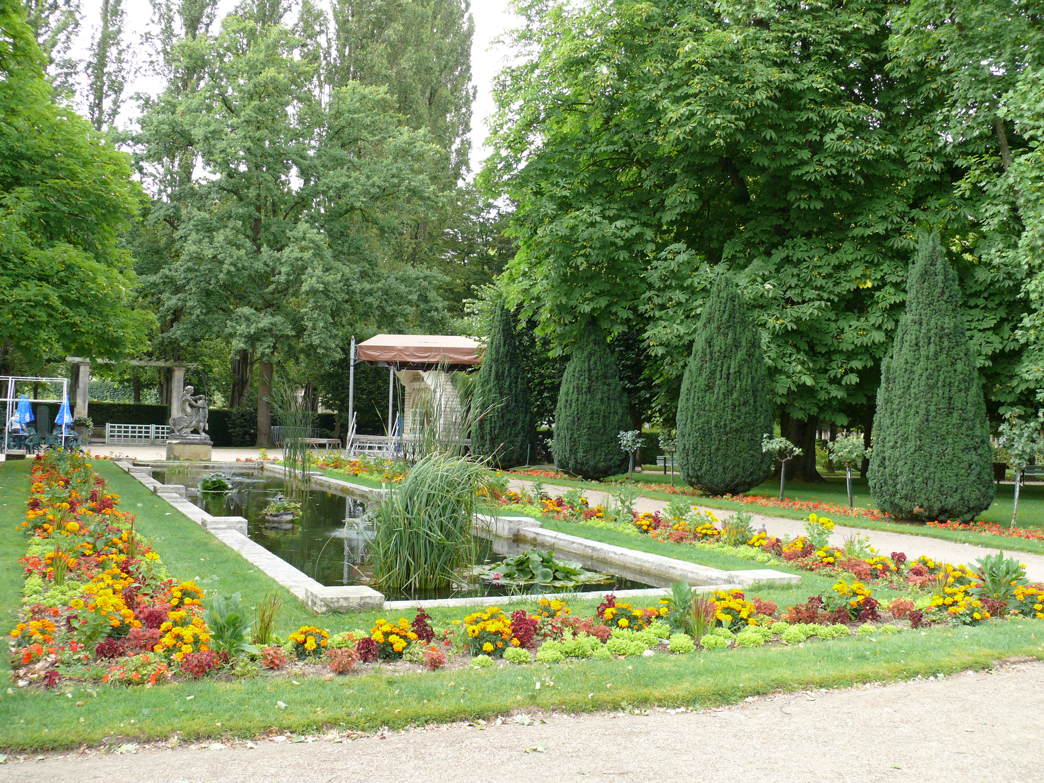 Bourges - Jardin des Prés-Fichaux